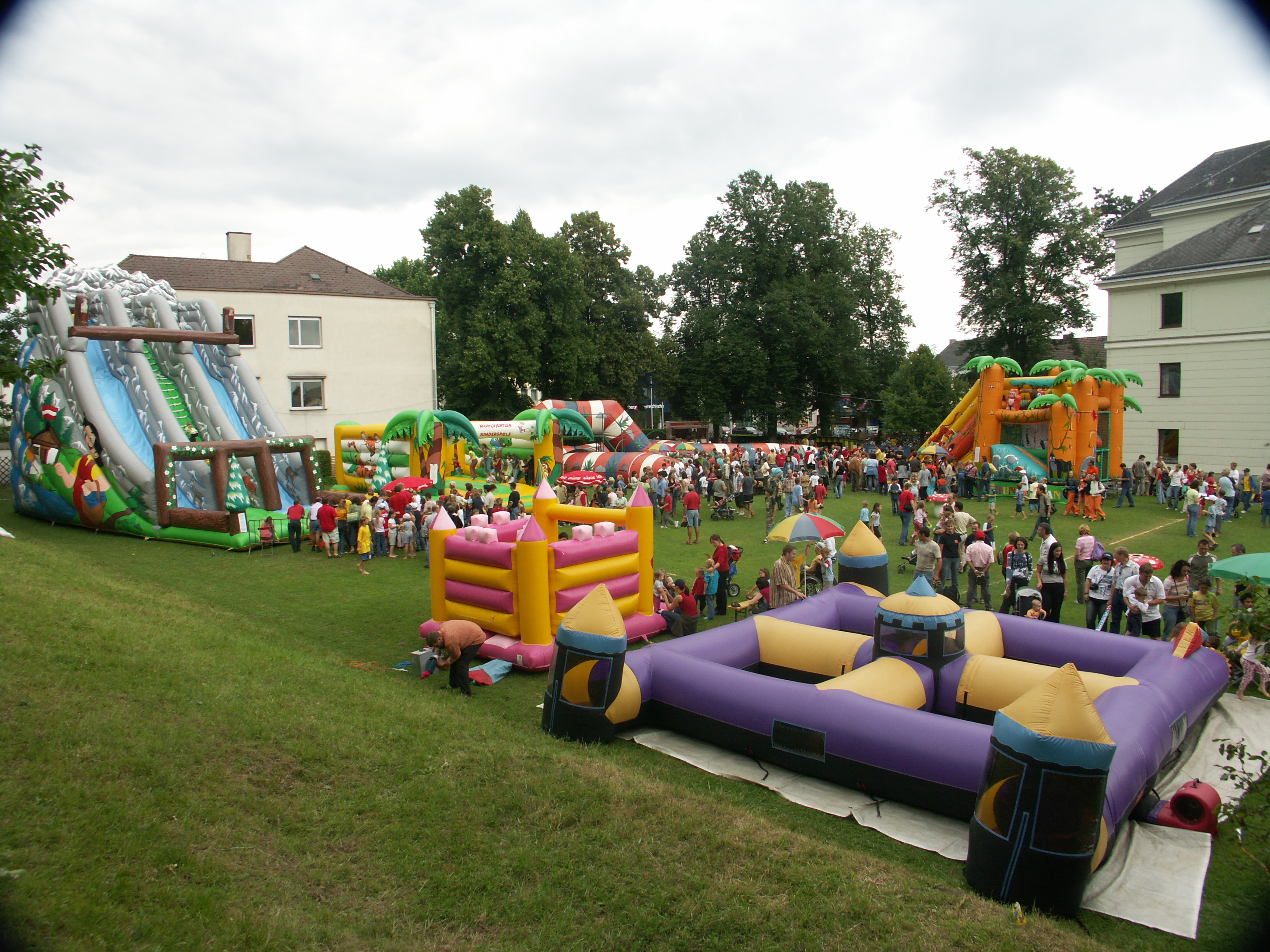 Festgelände der Mühlviertler Kinderspiele in Perg auf dem Sportplatz der Hauptschule 1 hinter dem Hauptschulnebengebäude (Alte Volksschule)